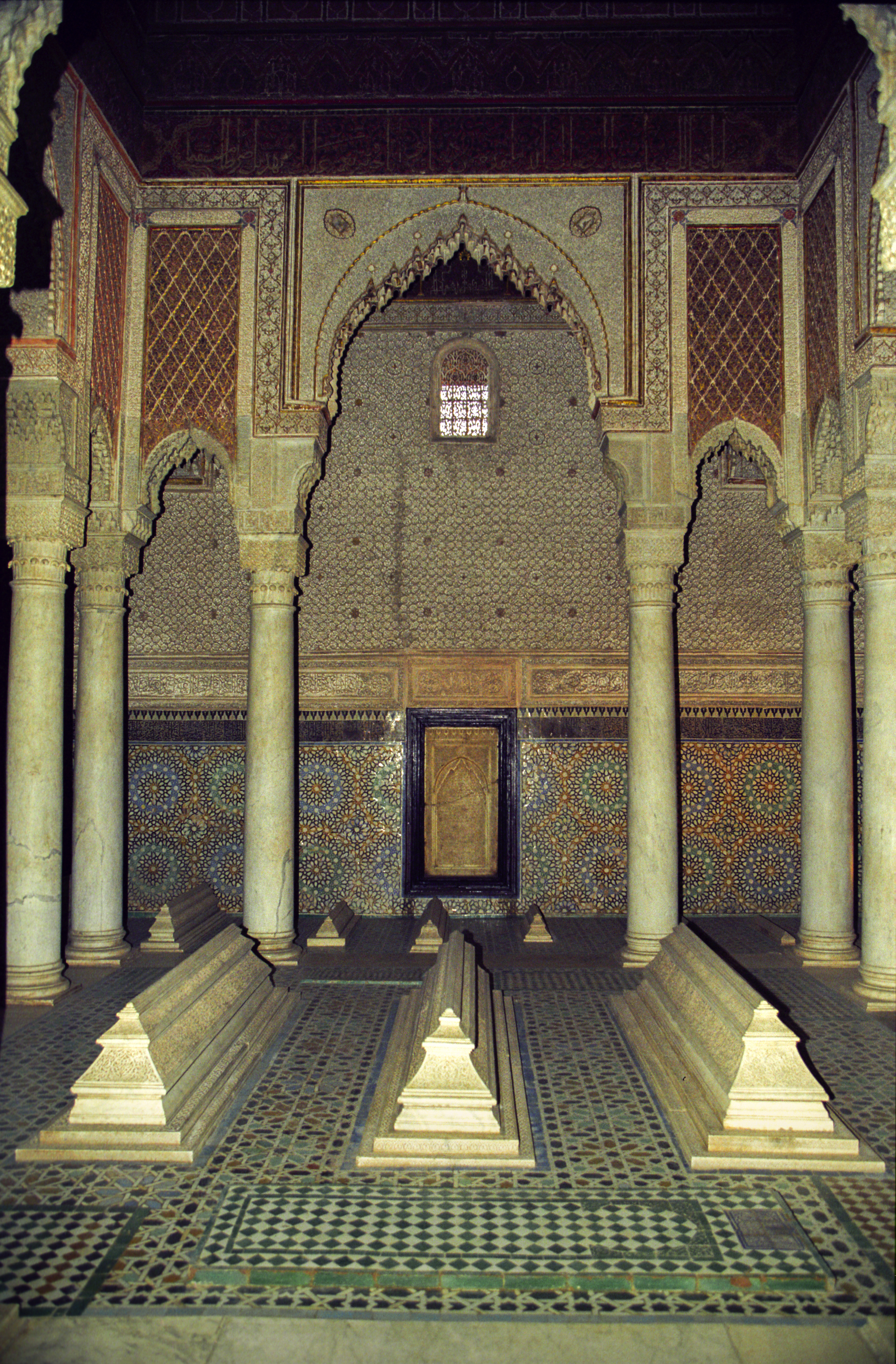 Marakesz. Grobowce Saadytów